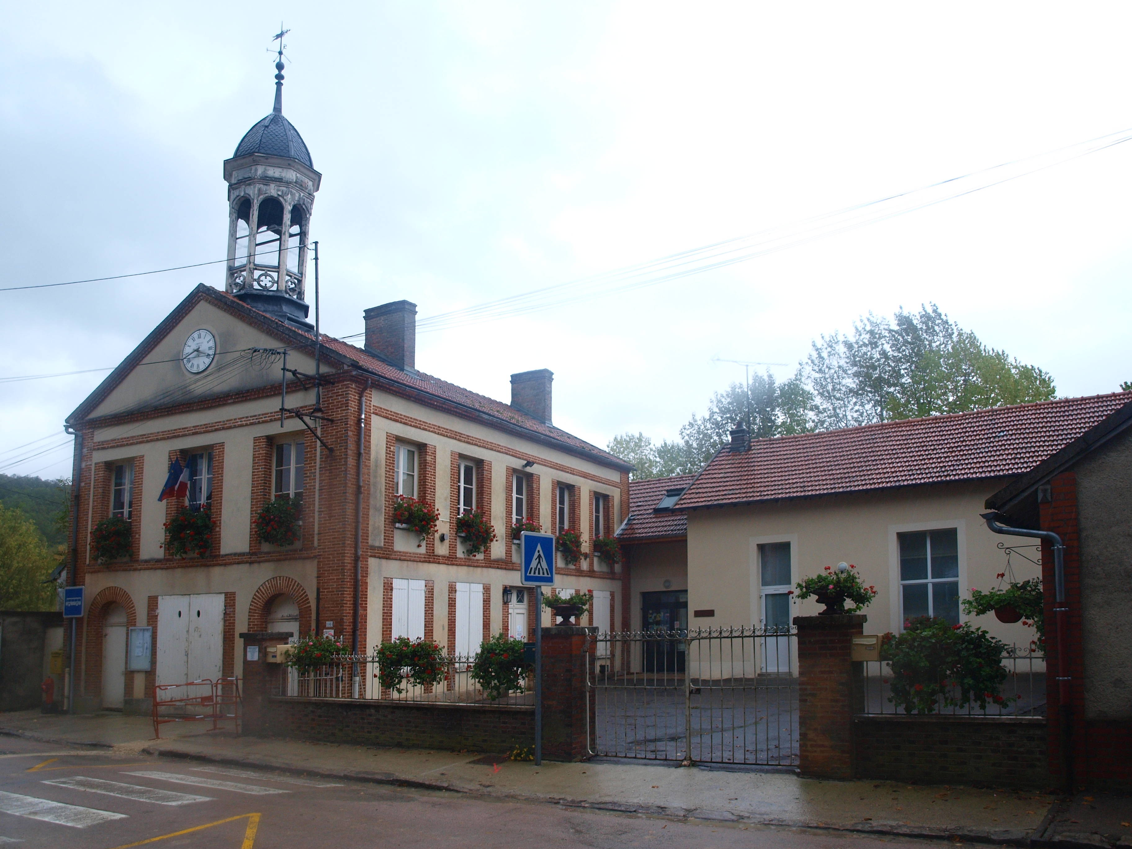 La Saulsotte (Aube, France) ; mairie